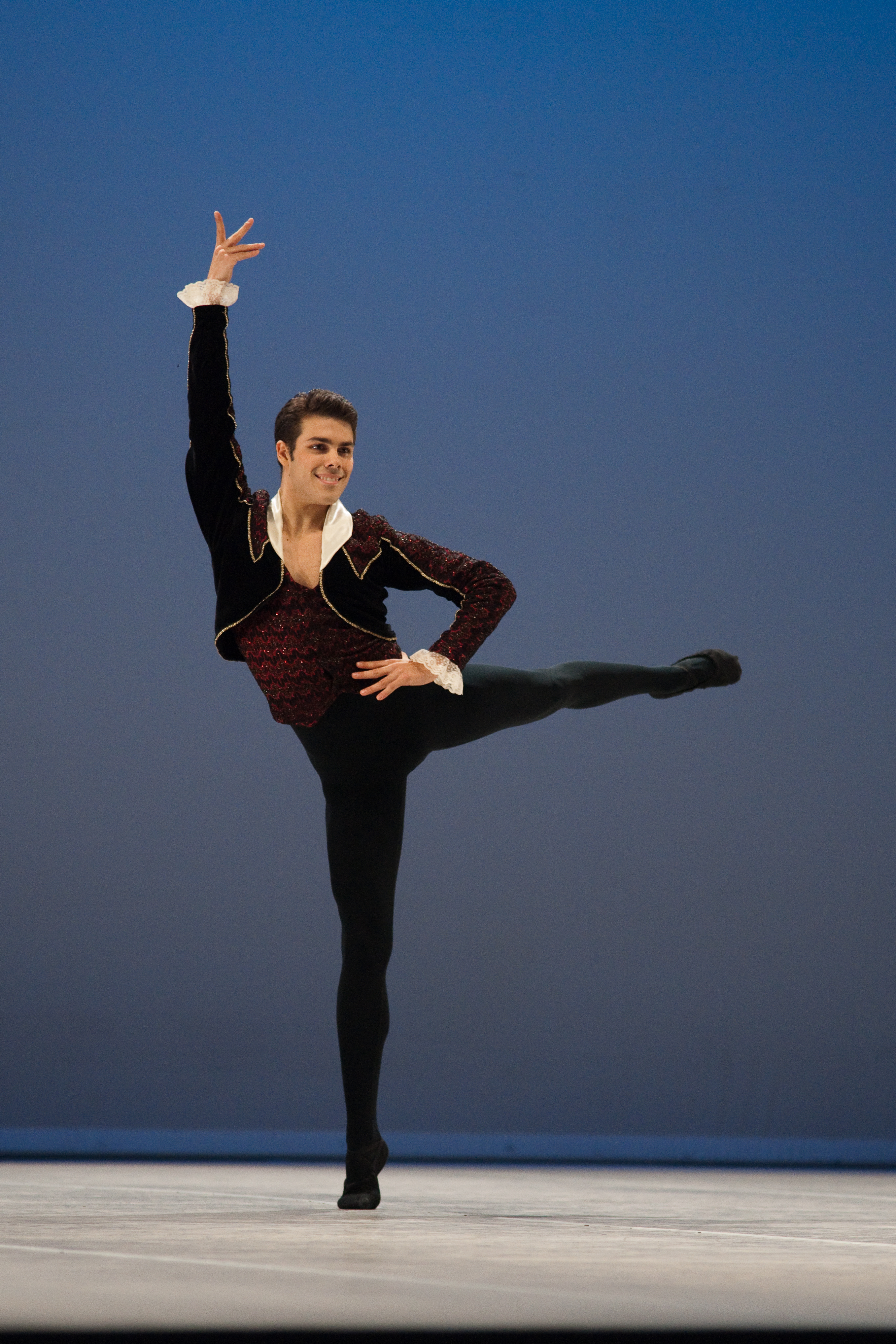 Variation extraite de Don Quichotte au Prix de Lausanne 2010. The making of this document was supported by Wikimedia CH. (Submit your project!) For all the files concerned, please see the category Supported by Wikimedia CH.